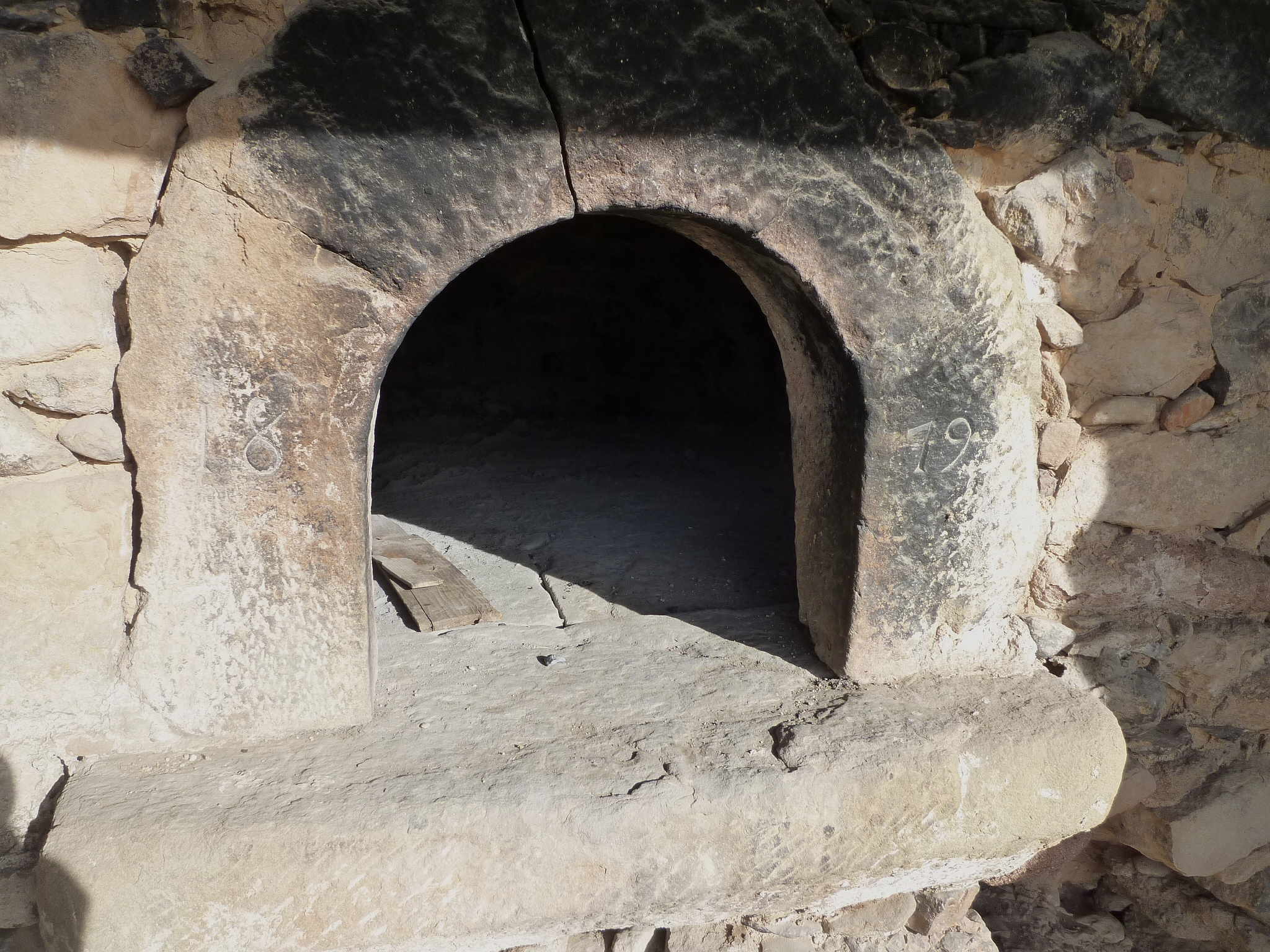 Ca la Rita o Cova de la Fada (Odèn): Forn amb data 1819